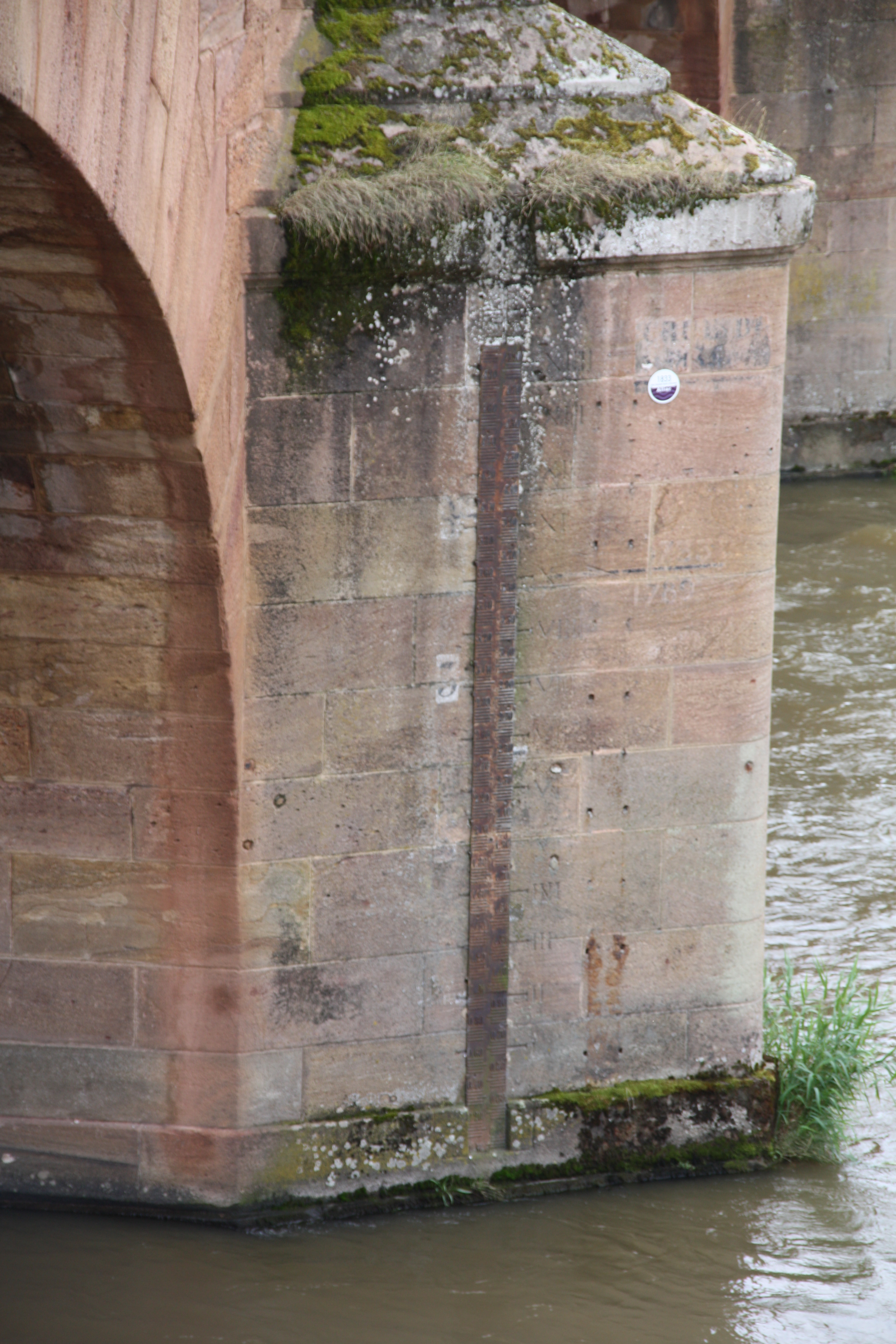 Le Pont Régemortes à Moulins, France.